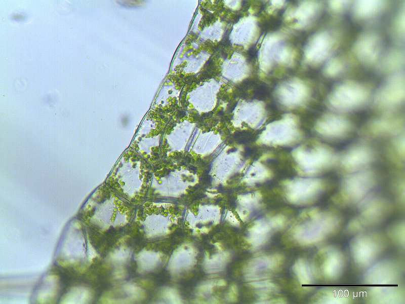 Kelch-Beckenmoos (Pellia endiviifolia), Thallusrand, Vergrößerung: 250x